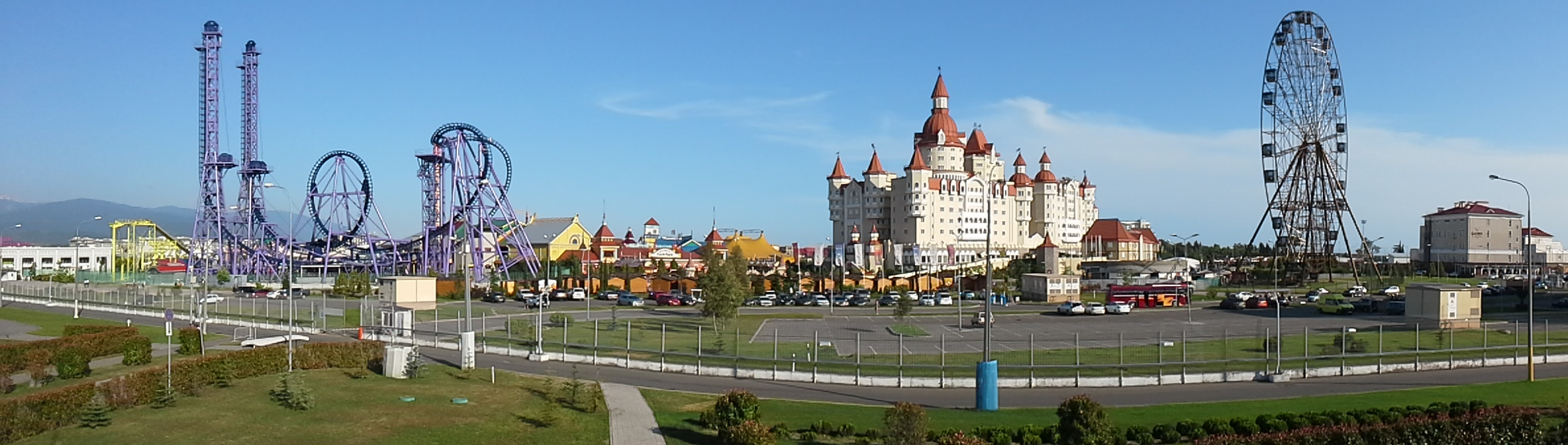 Сочи, Краснодарский край, Россия